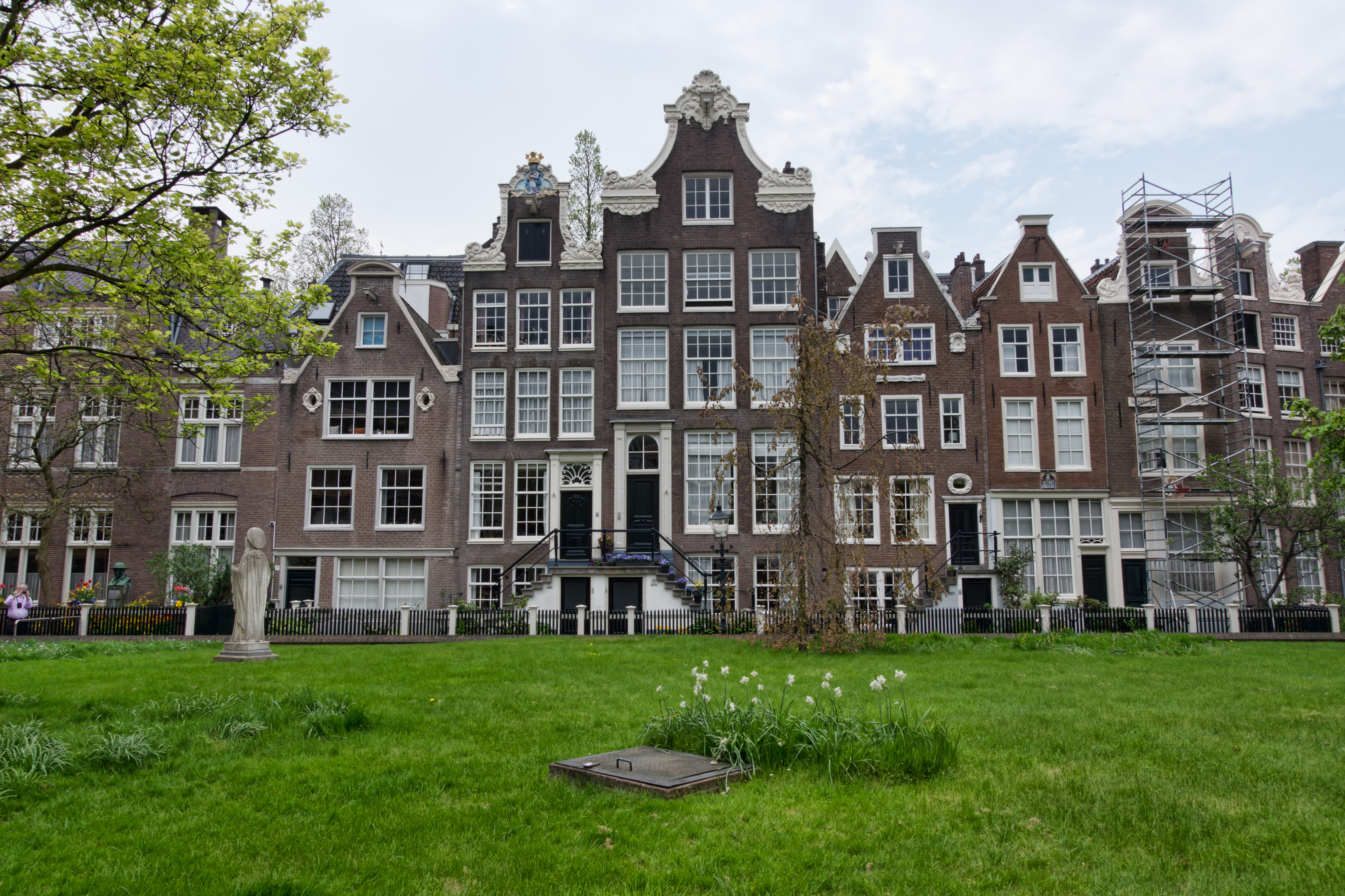 Maisons typiques du Begijnhof d'Amsterdam This is an image of rijksmonument number 361 This is an image of rijksmonument number 362